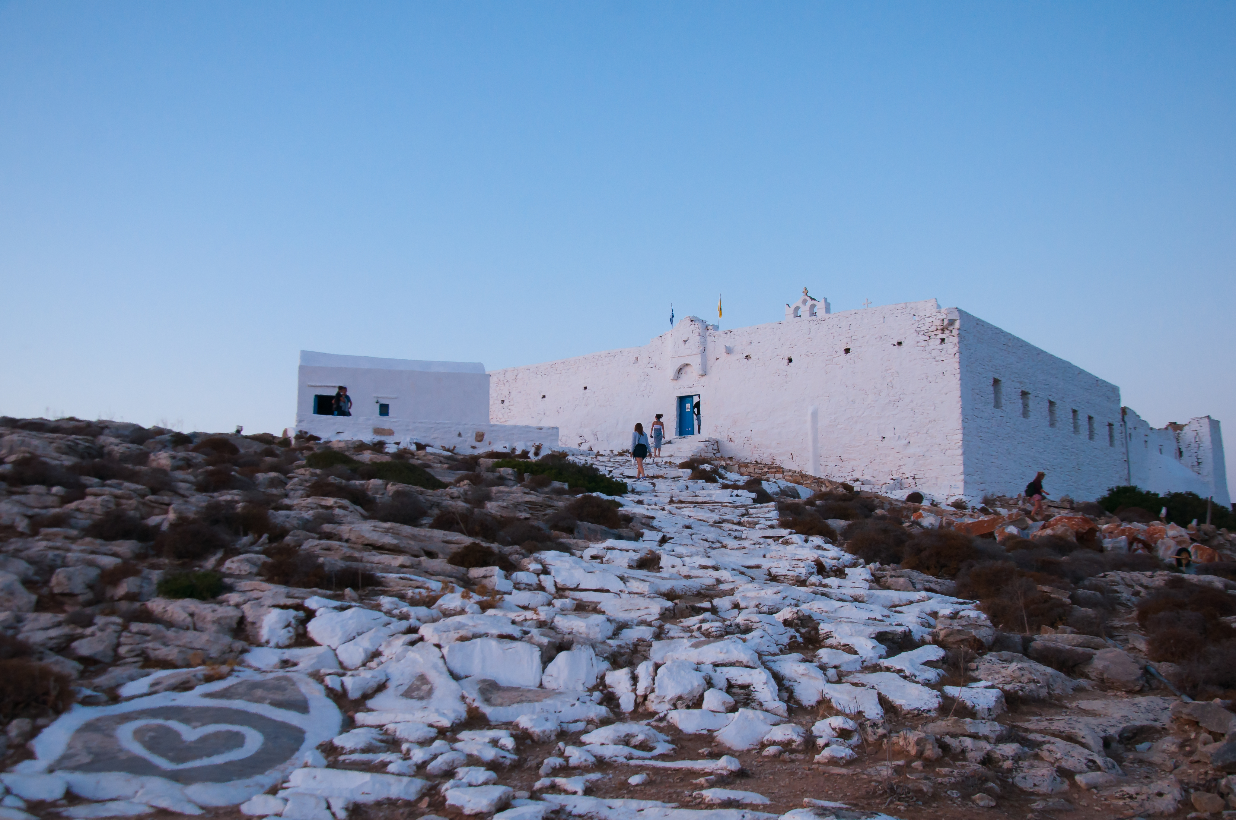 Μονή Ζωοδόχου Πηγής Σικίνου«Μονή Ζωοδόχου Πηγής Σικίνου»